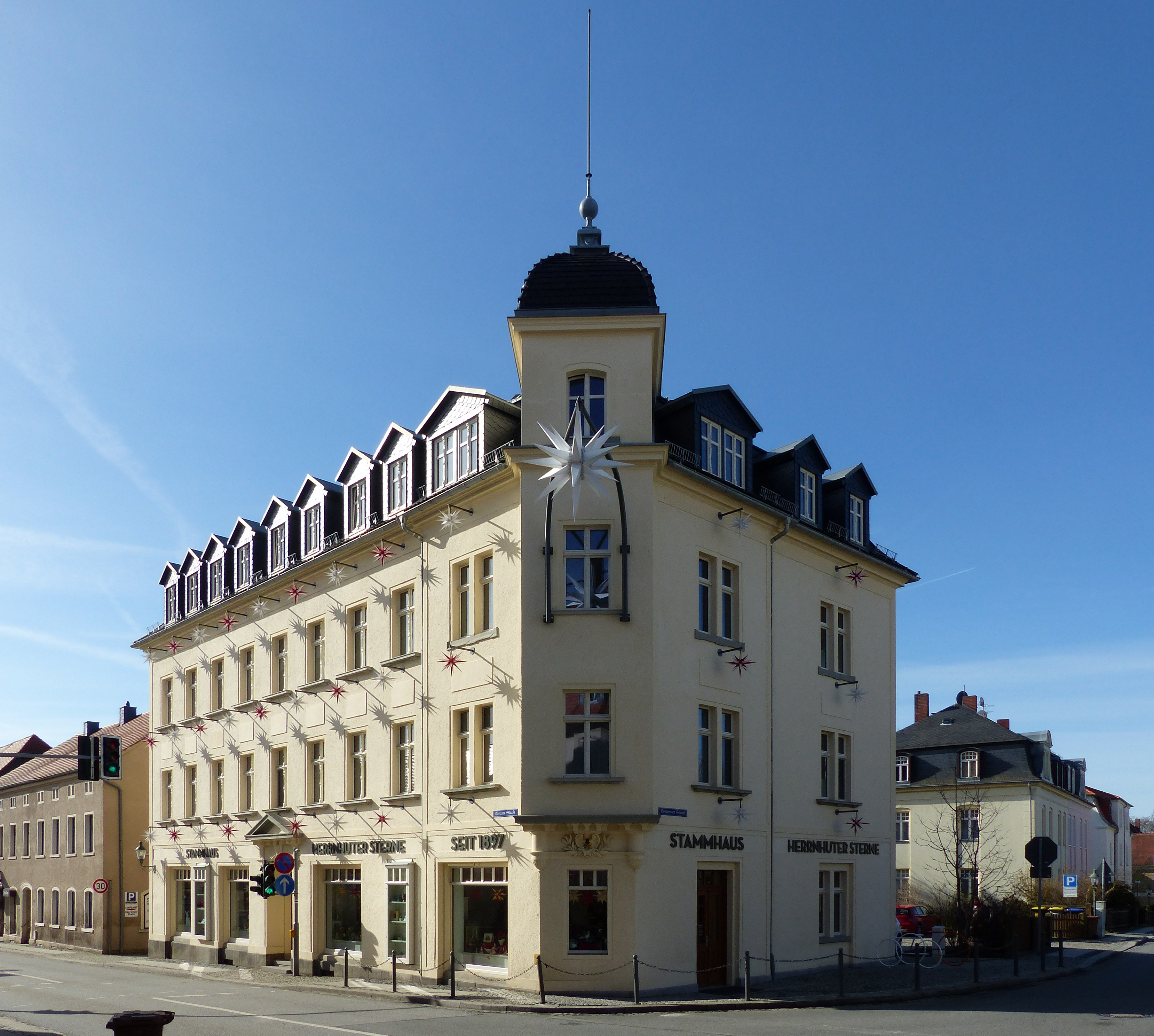 Denkmalgeschütztes Stammhaus Herrnhuter Sterne, Löbauer Straße 21, Herrnhut